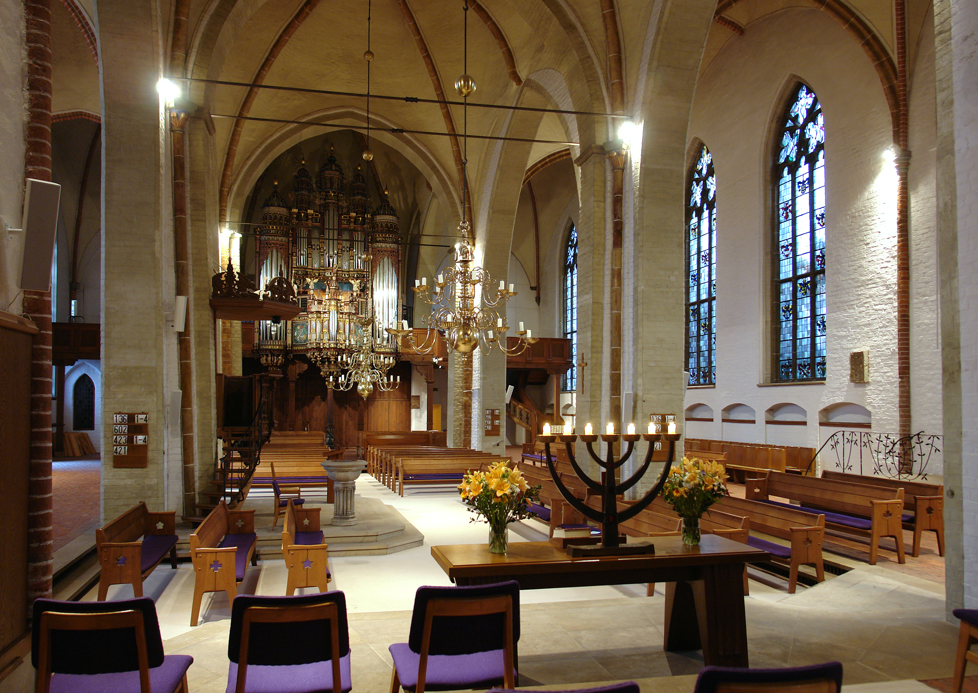 St.Martini-Kirche in Bremen. Blick vom Chor auf Orgelprospekt (1619), Leuchter (1650), Kanzel (Ende 16.Jh.), Taufbecken aus Sandstein (Zeit unbekannt)